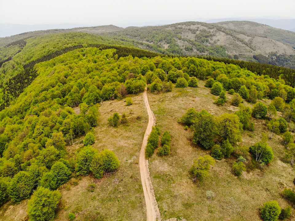 Mountain Ostrozub